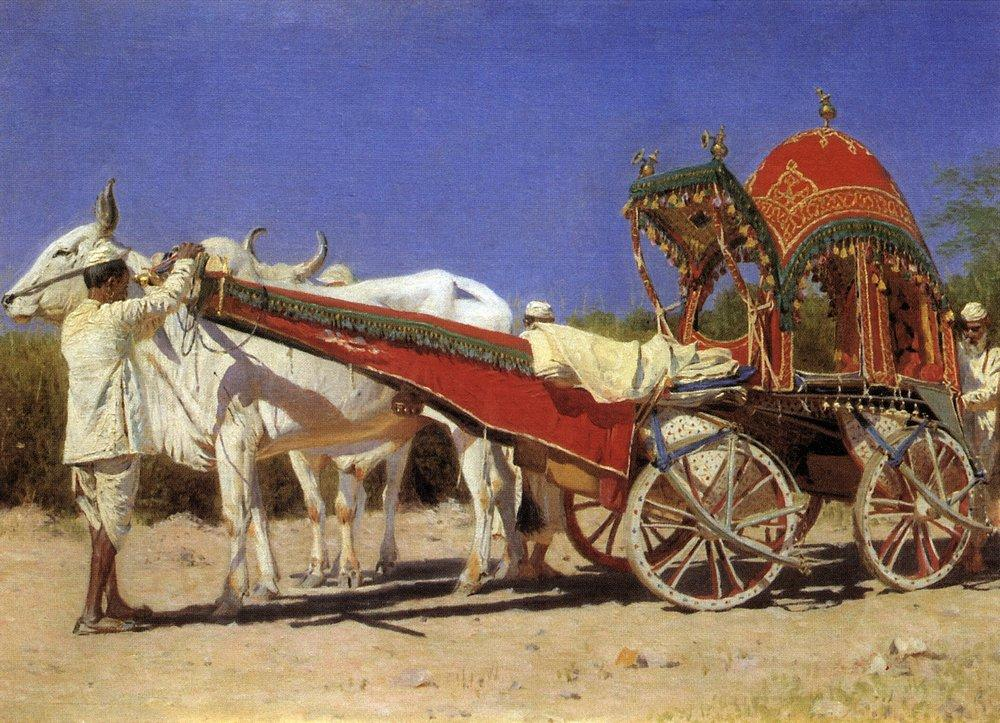 Повозка богатых людей в Дели